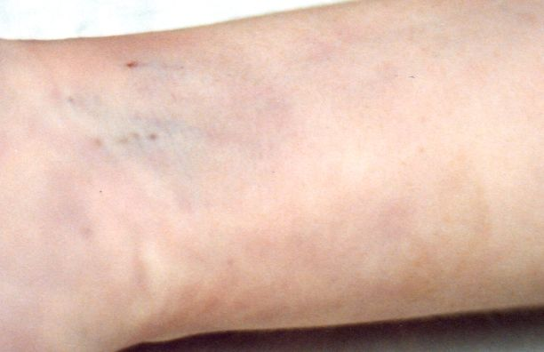 Venopuncions al canell d'un addicte a l'heroïna.